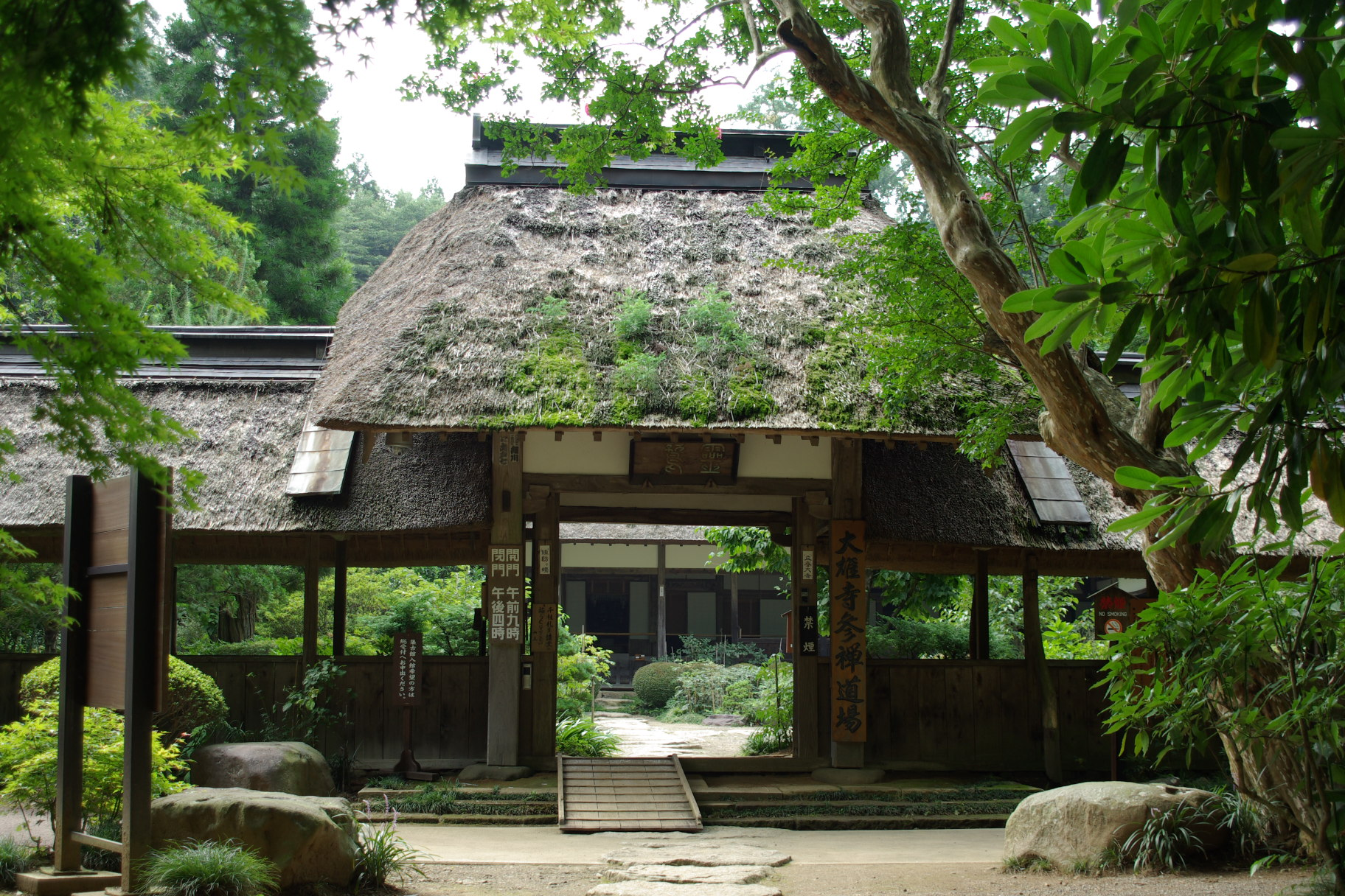 栃木県大田原市大雄寺の総門。